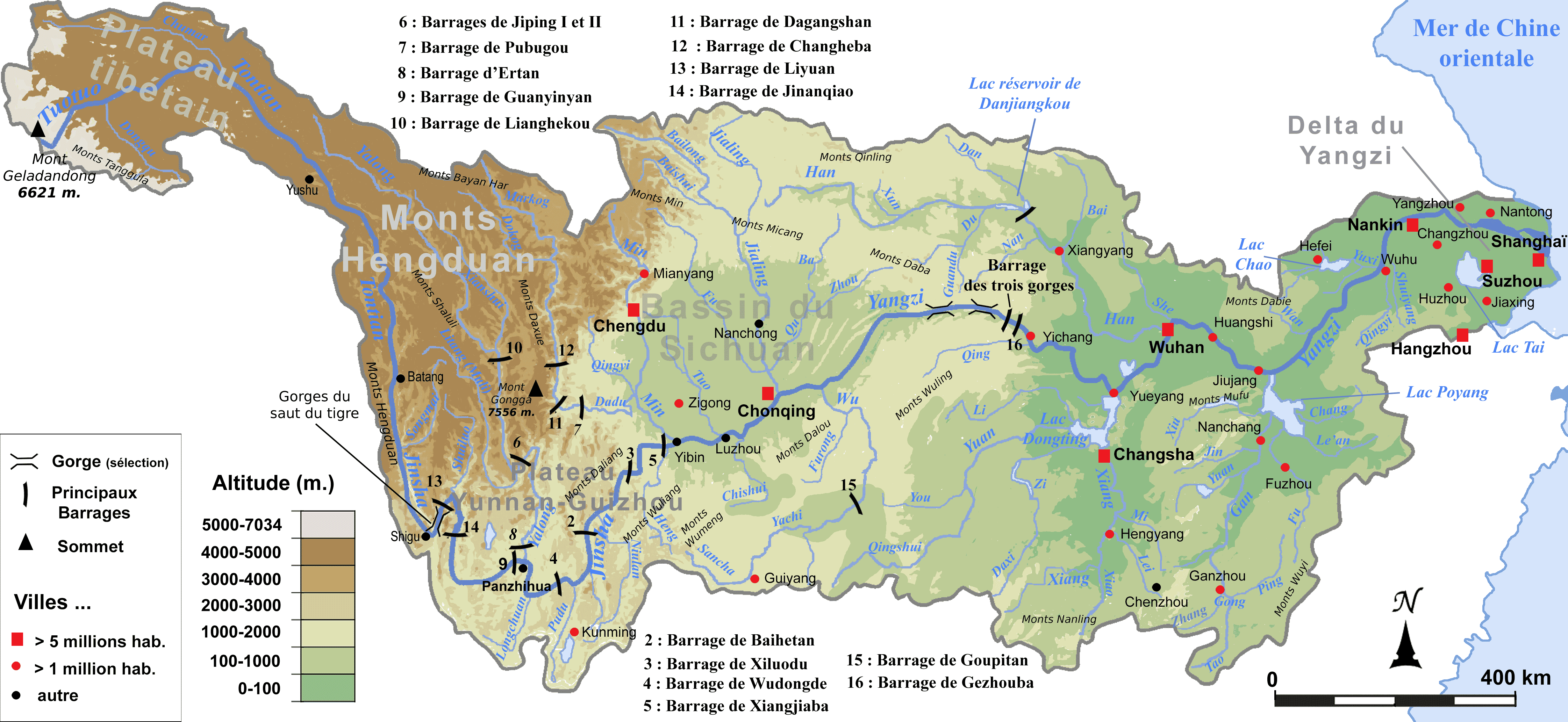 Bassin fluvial du Yangzi Jiang : topographie, principaux affluents, barrages ayant une puissance installée de plus de 2000 MW et villes millionaires